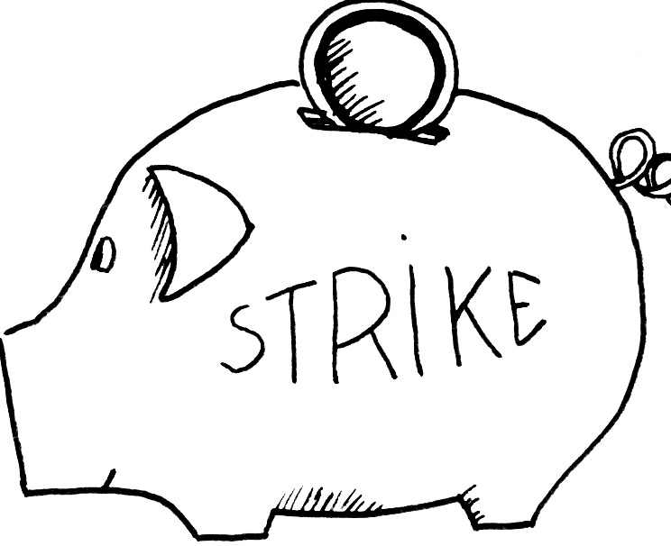 Streikekasse